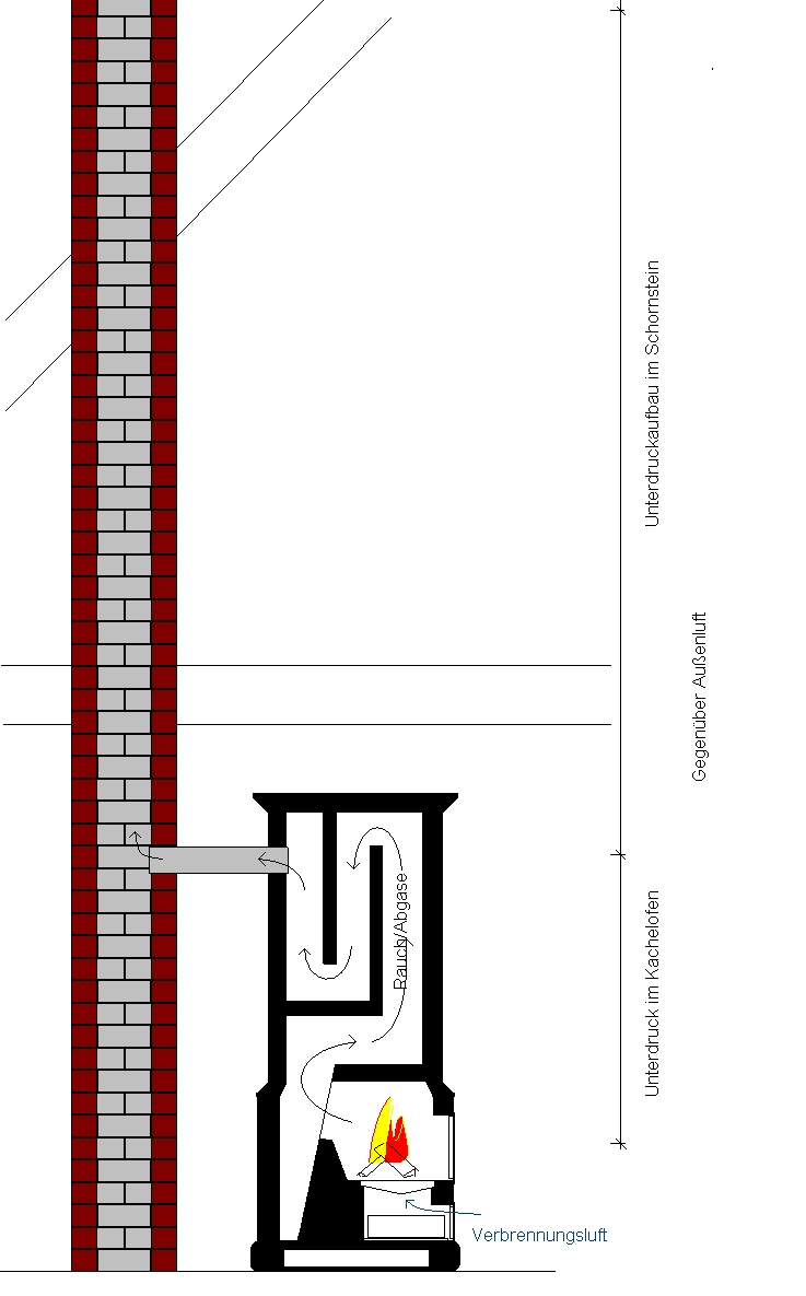 Funktionsschema Berliner Ofen